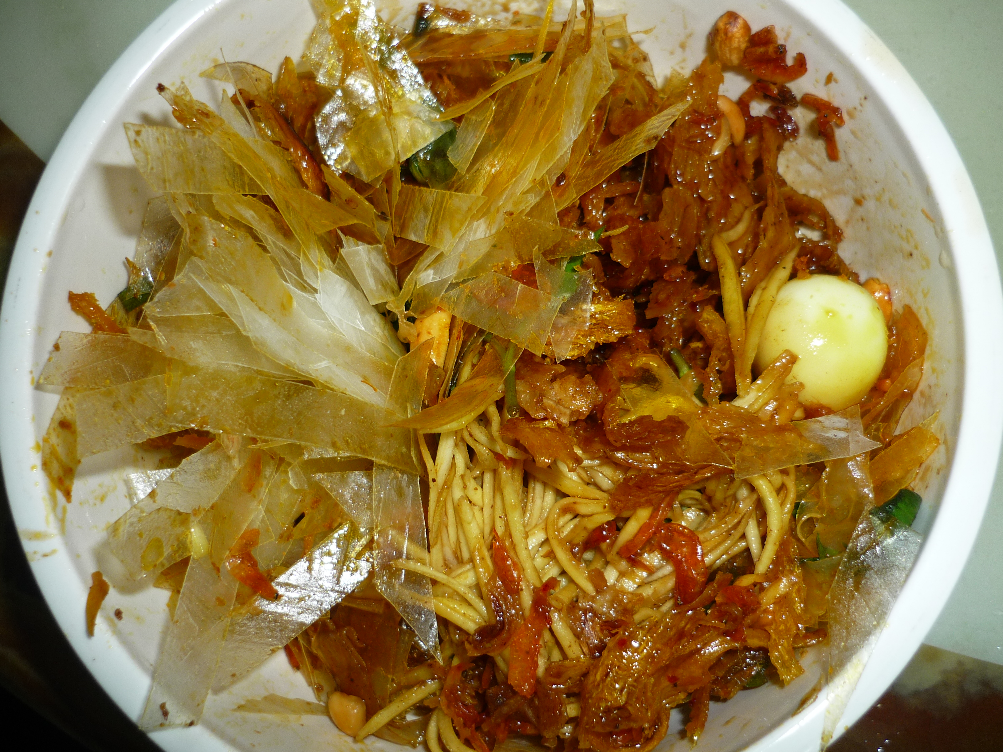 Bánh tráng trộn bán tại TPHCM